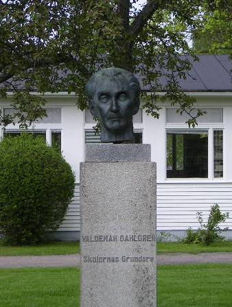 Folkbildaren och rektorn Valdemar Dahlgrens byst på Ingesund.